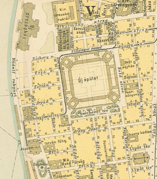 Az Újépület helye a Lipótvárosban